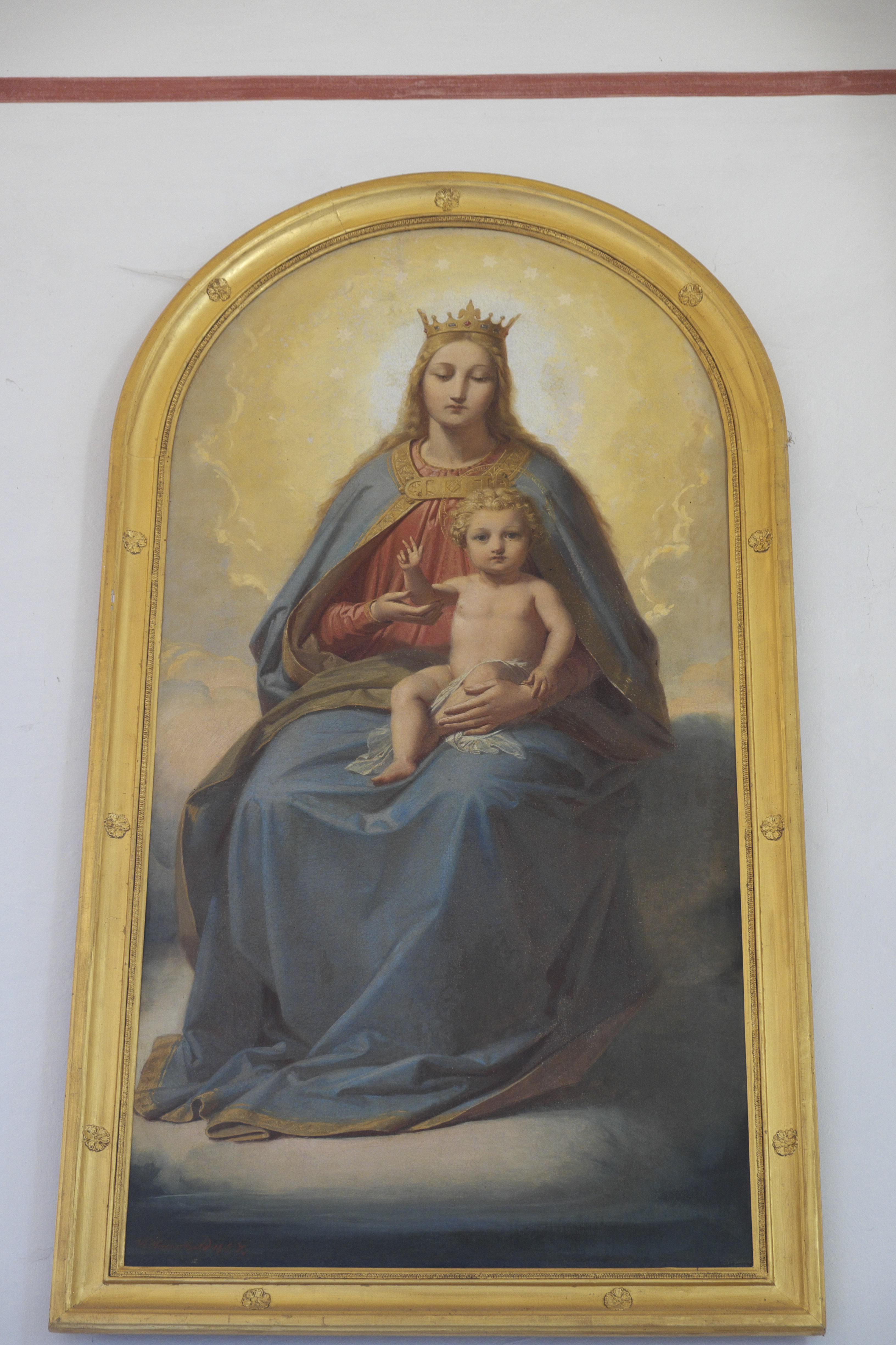 Katholische Filialkirche St. Bartholomäus in Maising (Pöcking) im Landkreis Starnberg (Bayern, Deutschland), Madonna mit Kind